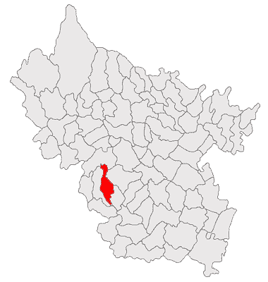 Categorie:Hărţi ale judeţului Buzău